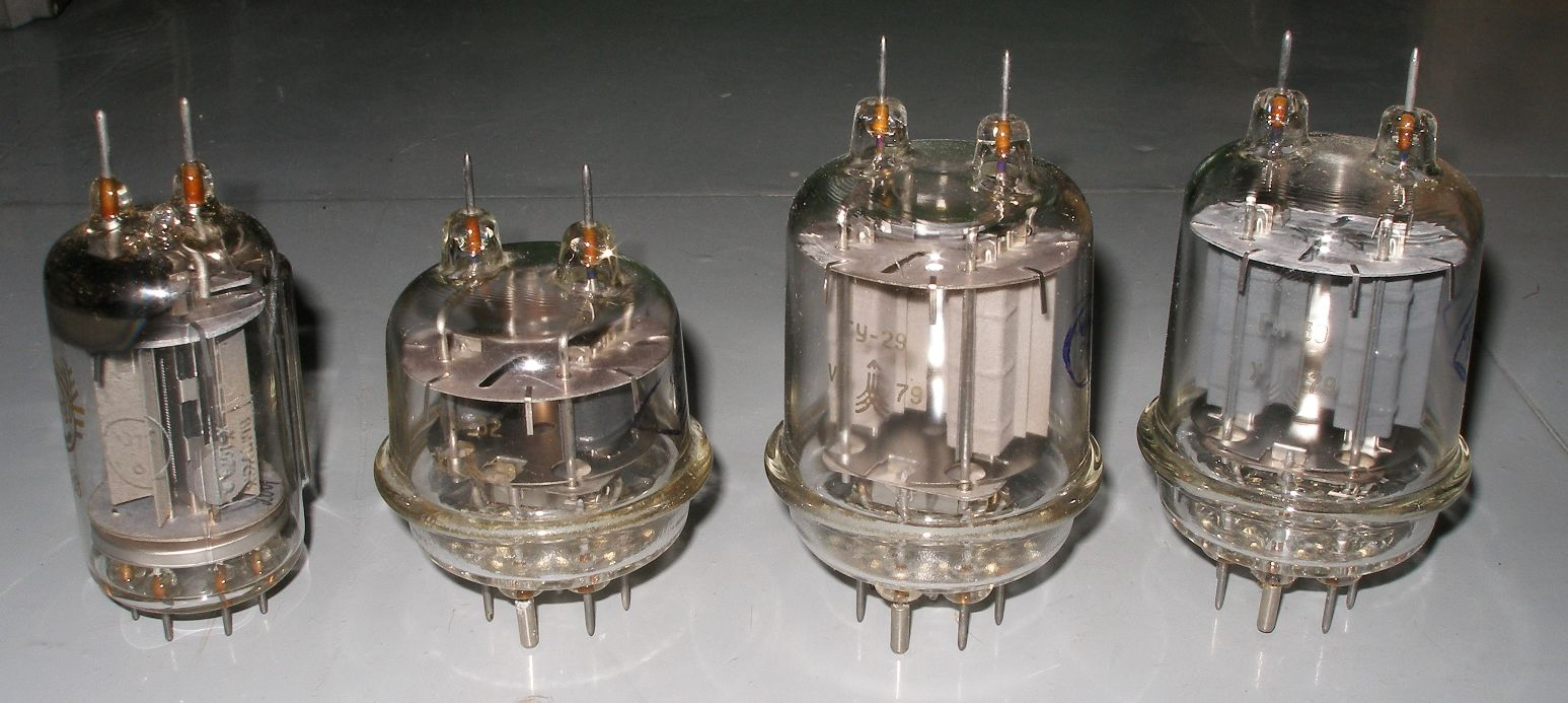 Russian transmitter tubes.